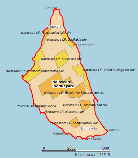 Naissaare looduspargi kaart. Põhineb Maa-ameti kaardil.